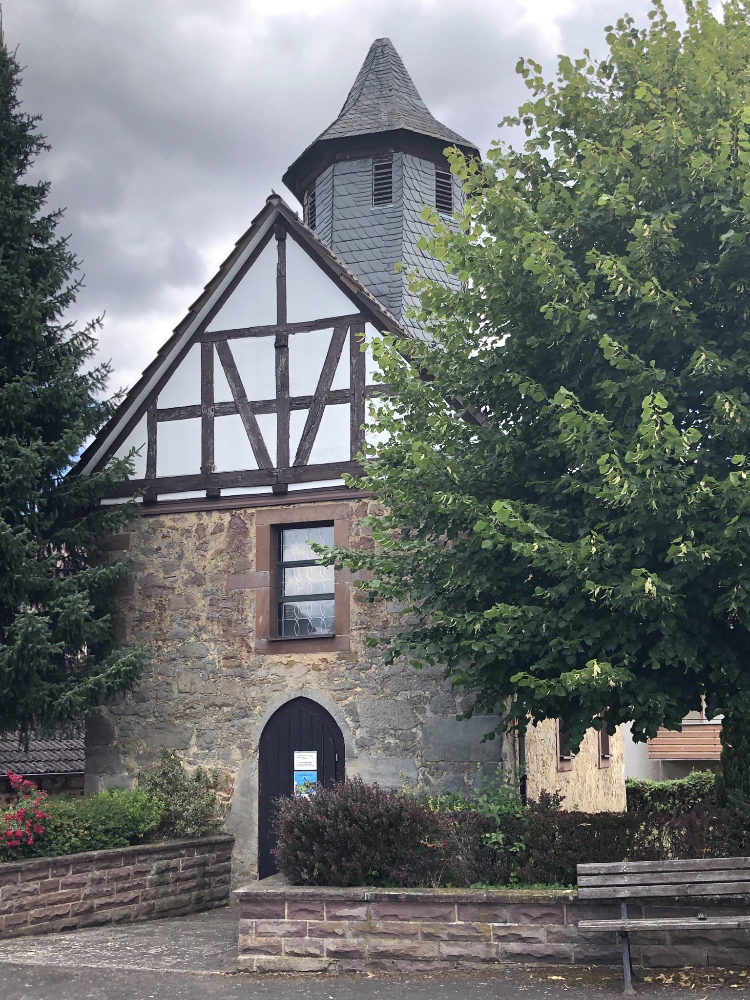 Kirchengebäude